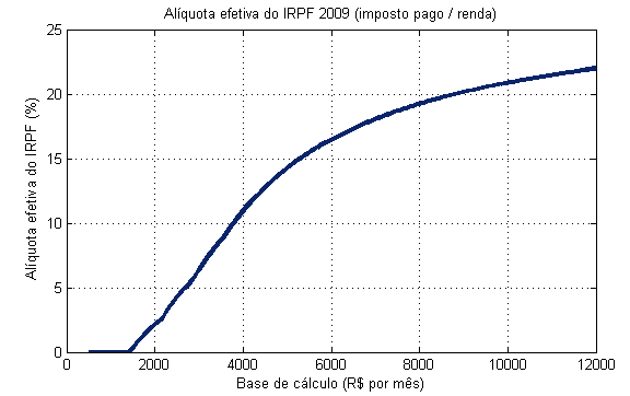 Gráfico de alíquota efetiva do IRPF 2010, ano-base 2009.